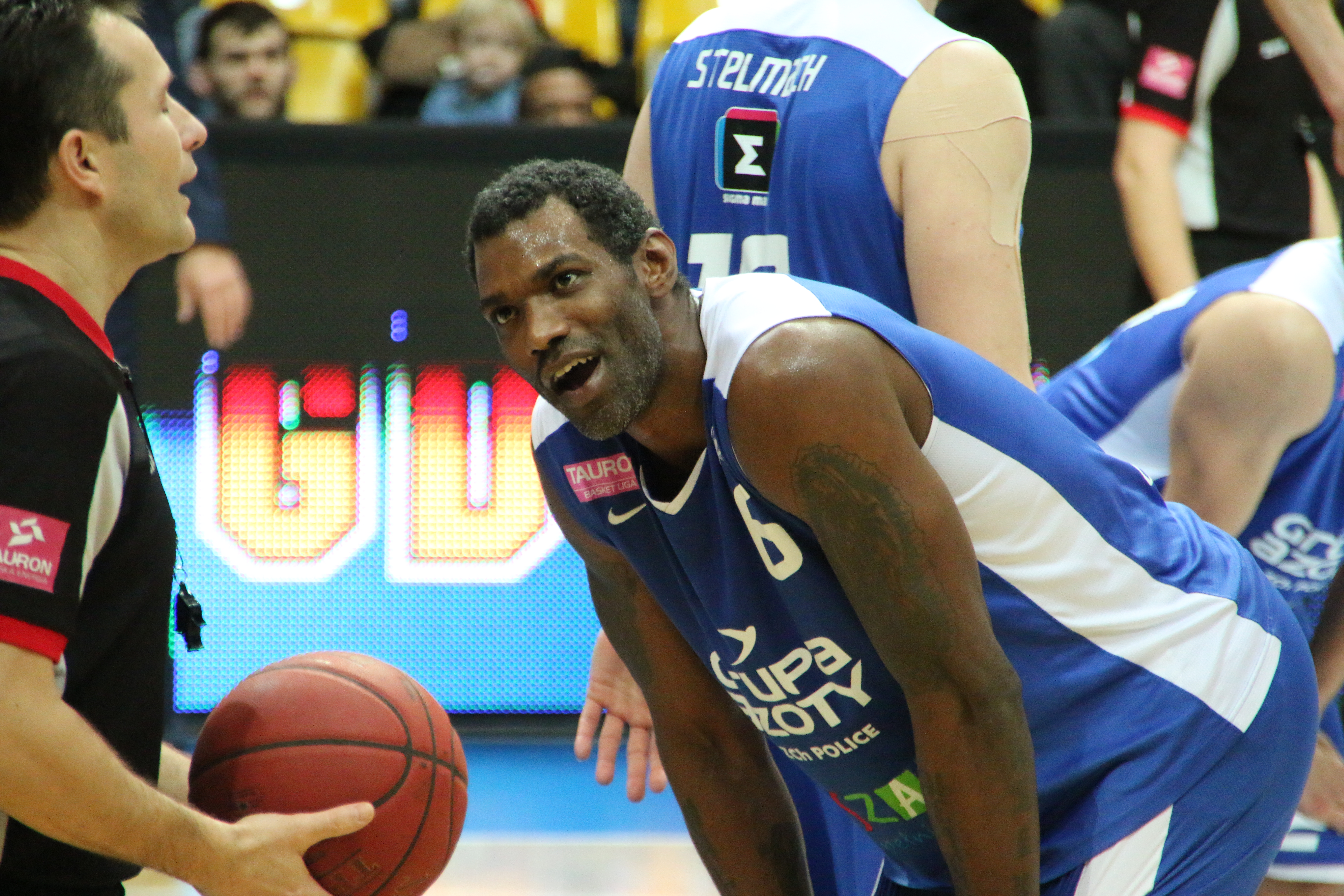 QWoods AZS Koszalin